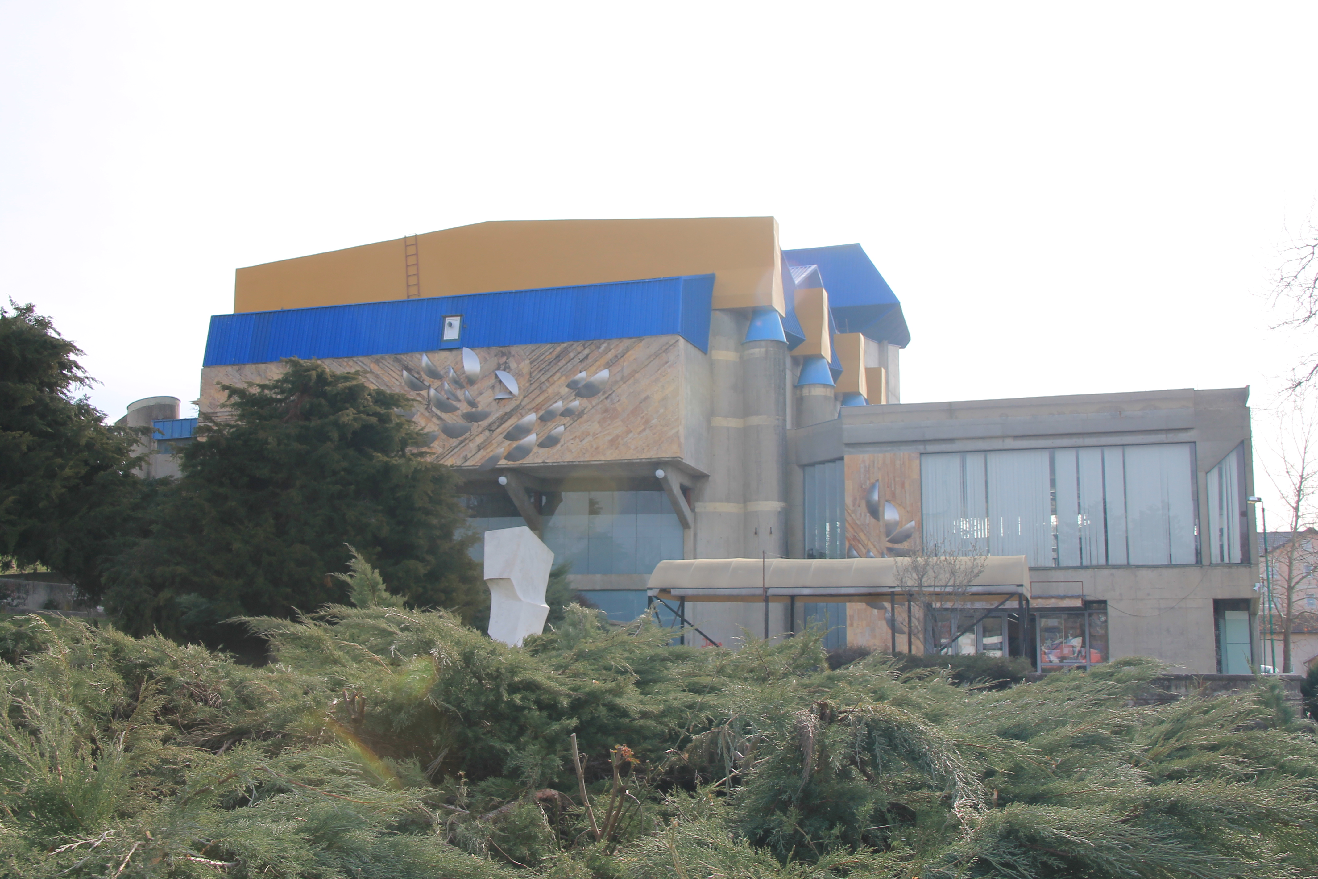 Kulturni centar Lazarevac